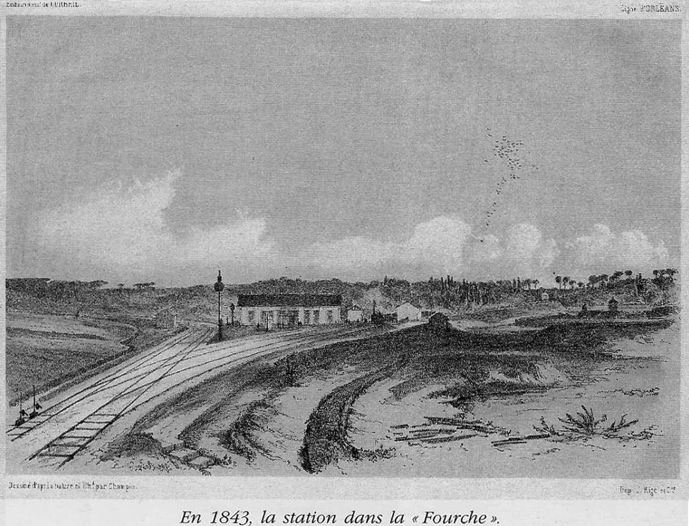 La gare provisoire de Juvisy, embranchement de Corbeil, ligne d'Orléans, en 1843